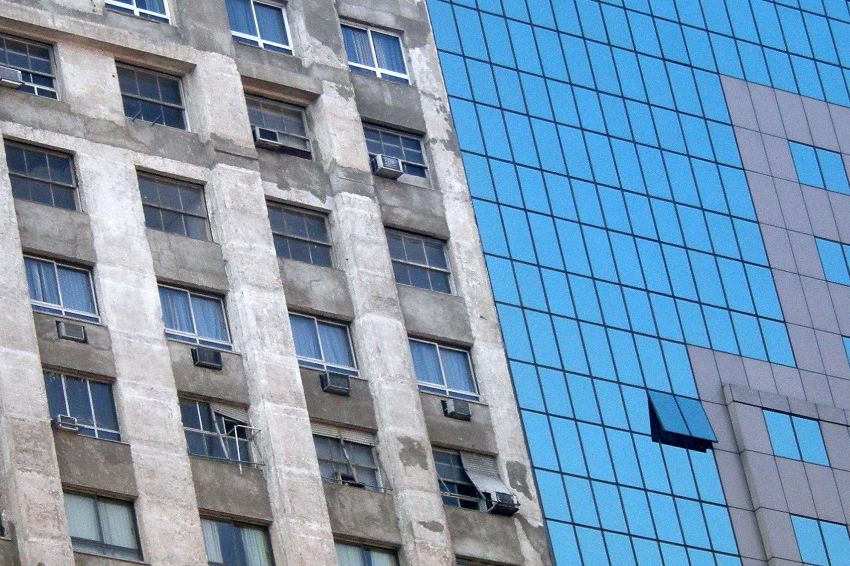 Edificio no centro do Rio de Janeiro.